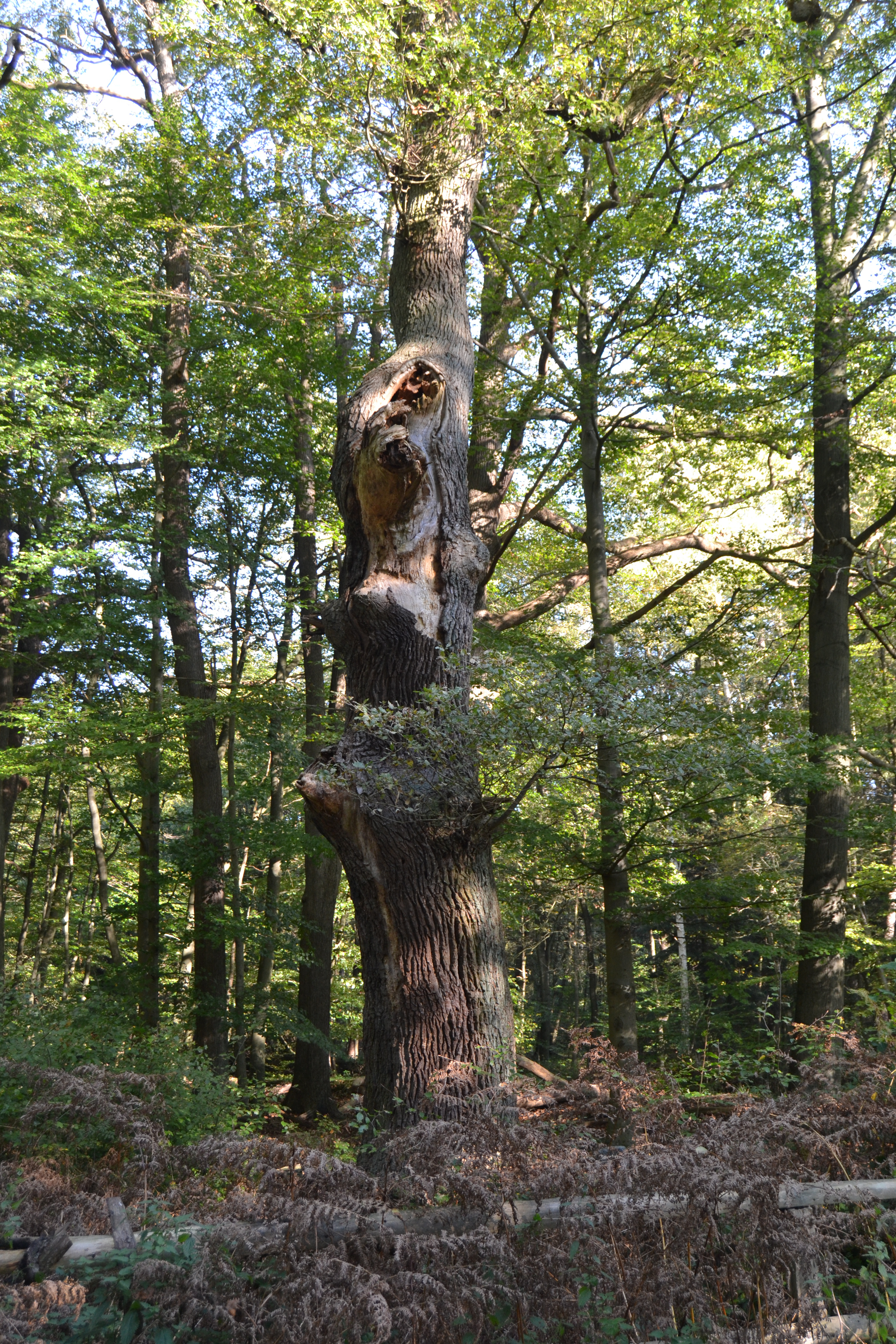 Der vom Zahn der Zeit schwer gezeichnete Stamm der Kocheiche im Kummerfelder Wohld/Gehege. Es ist das höchste und imposanteste Naturdenkmal im Kreis Pinneberg.